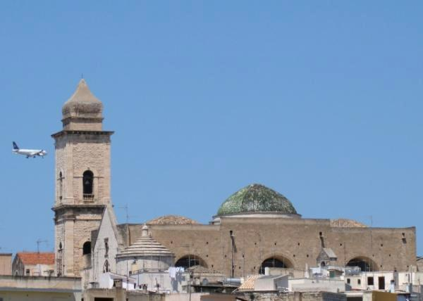 presa da [1]